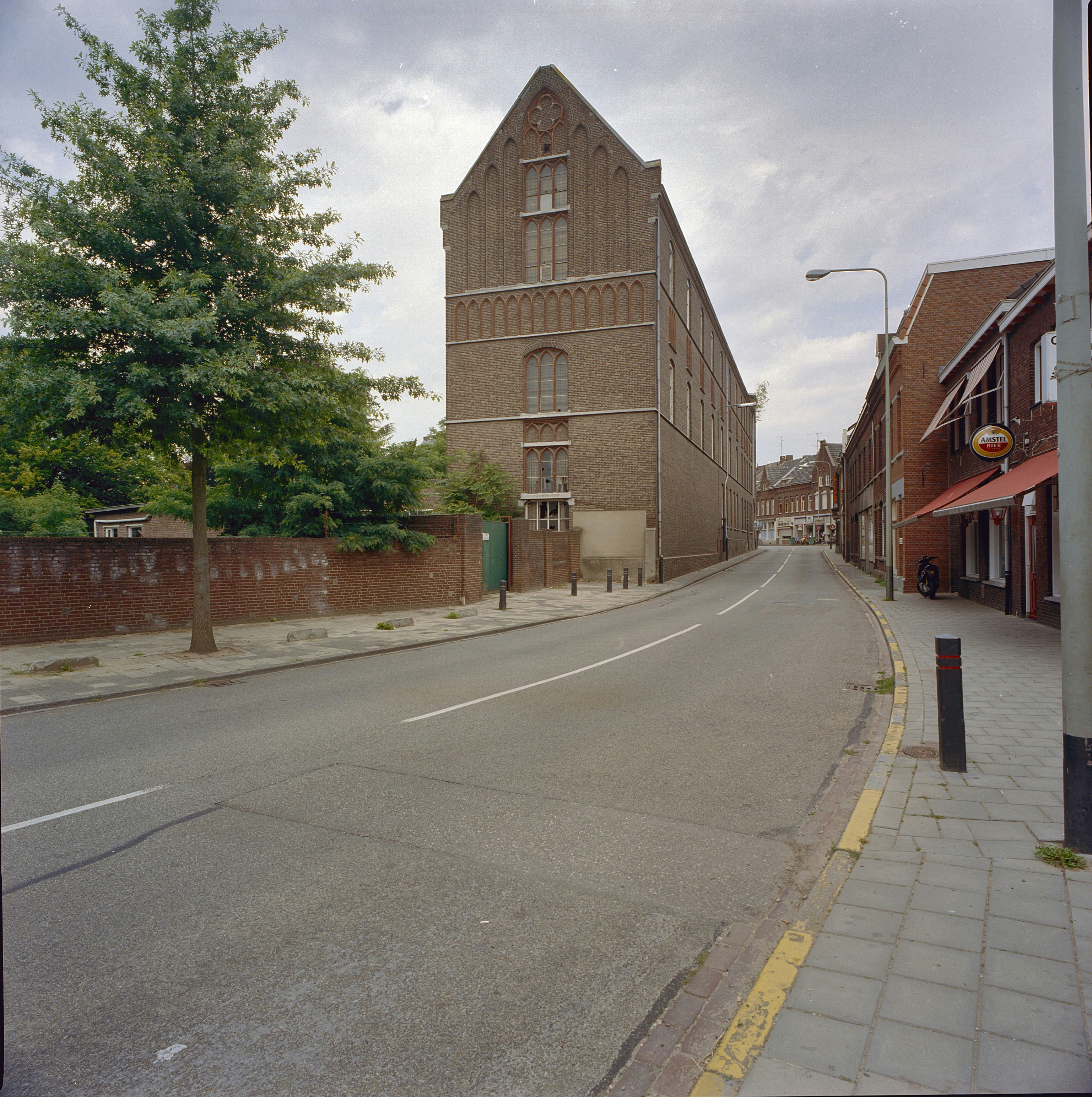 Kruiswegpark: Exterieur overzicht seminarie